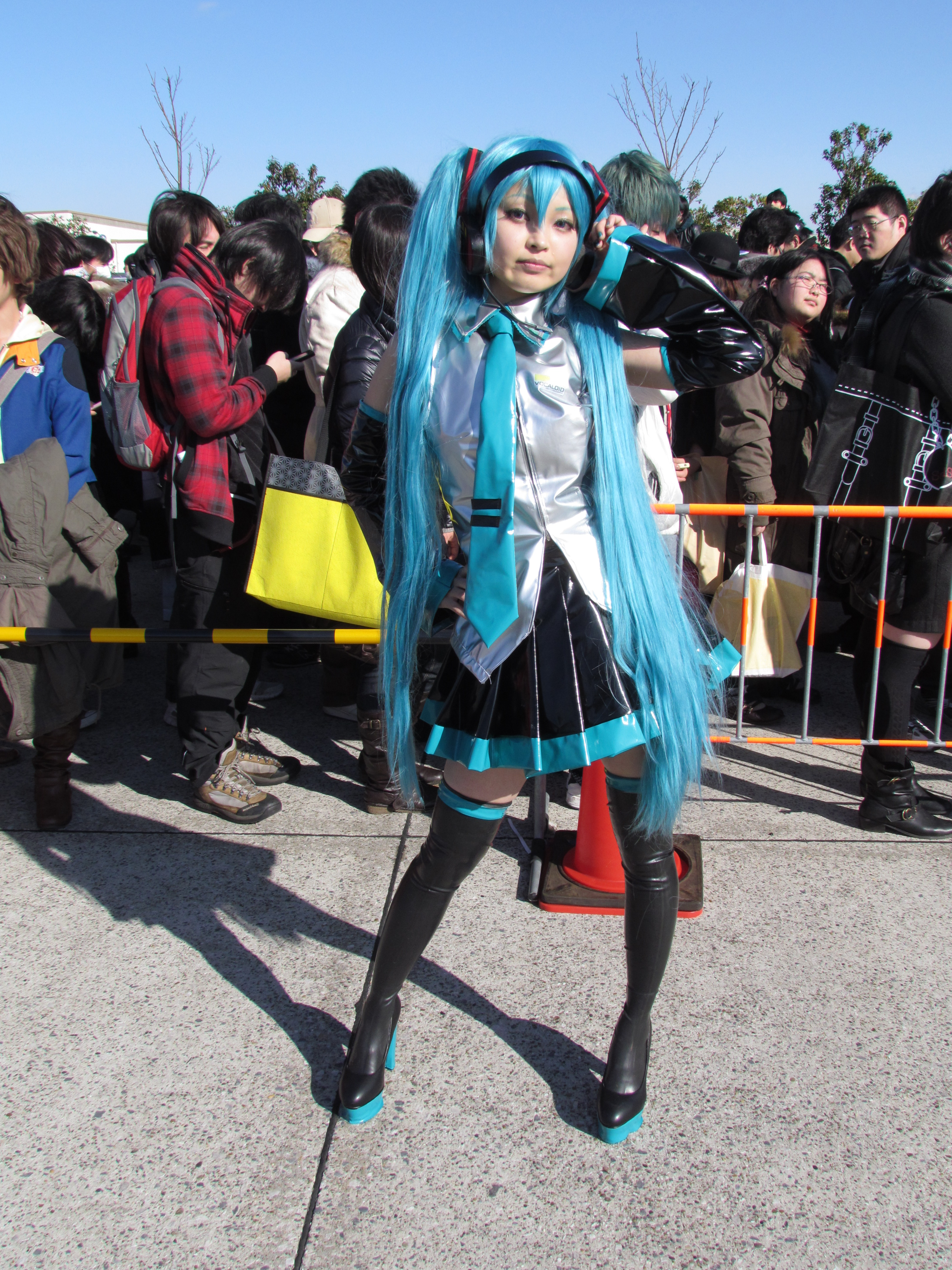 Miku Hatsune cosplay en Comiket 83.